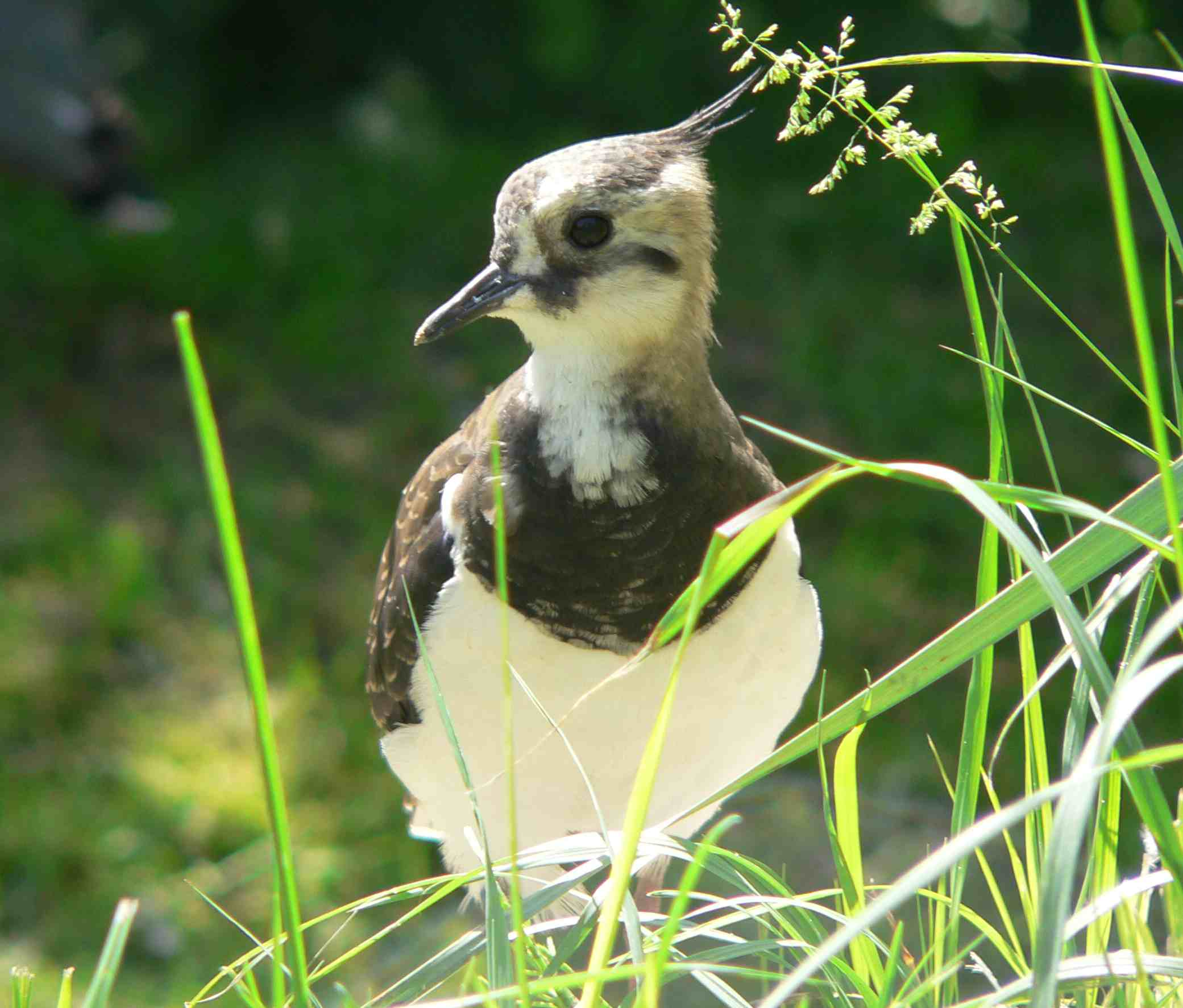 Vanellus vanellus en